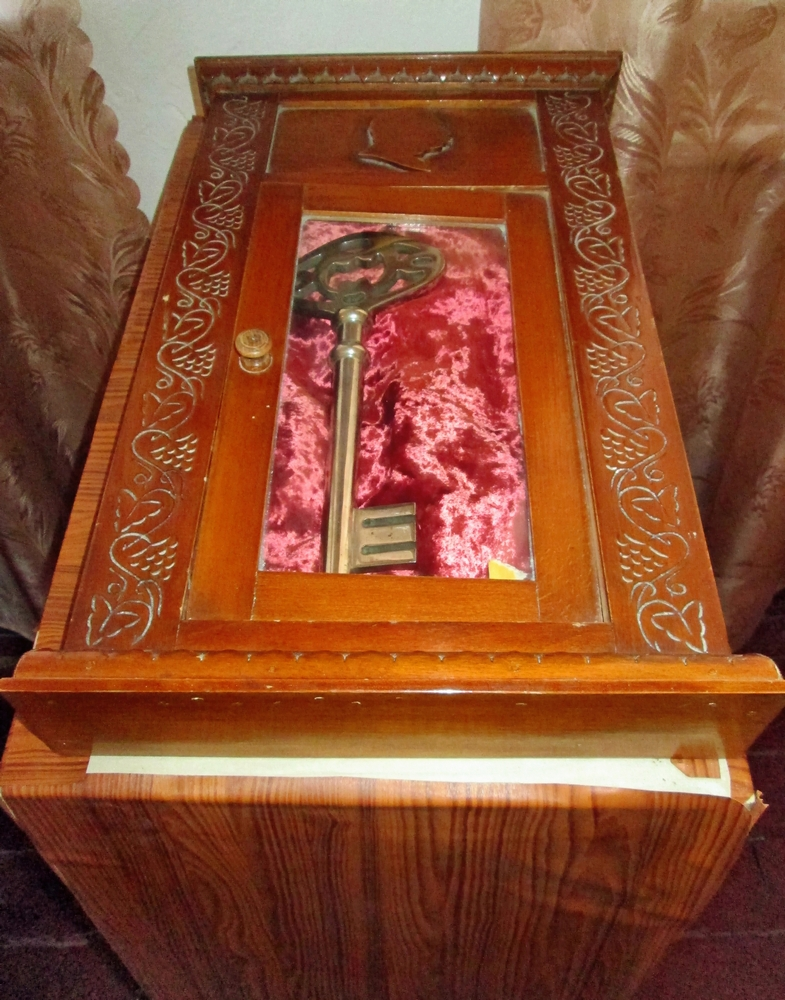 Символічний ключ від Мануйлівського літературно-меморіального музею Максима Горького у с. Верхня Мануйлівка (Козельщинський район, Полтавська область, Україна). З експозиції музею (зал №5)